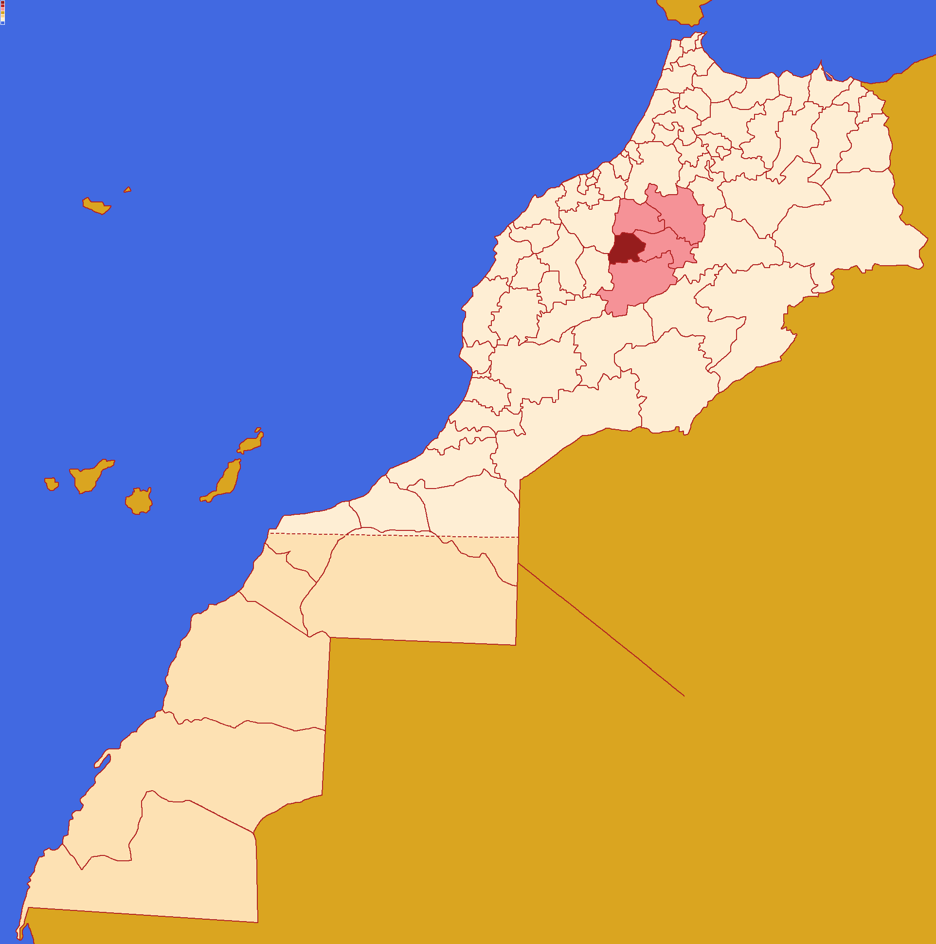 Localização da província de Fquih Ben Salah ,dentro da região de Beni Mellal-Quenifra ,dentro de Marrocos.Conforme a reforma administrativa de 2015.